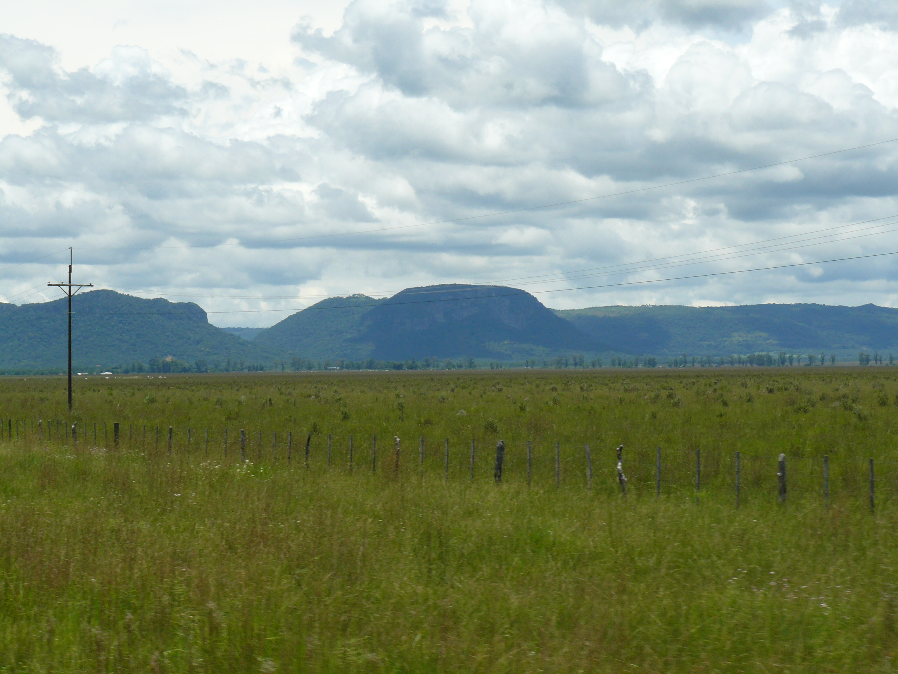 Paisaje de serranías de Paraguarí, Paraguay, Sudamérica